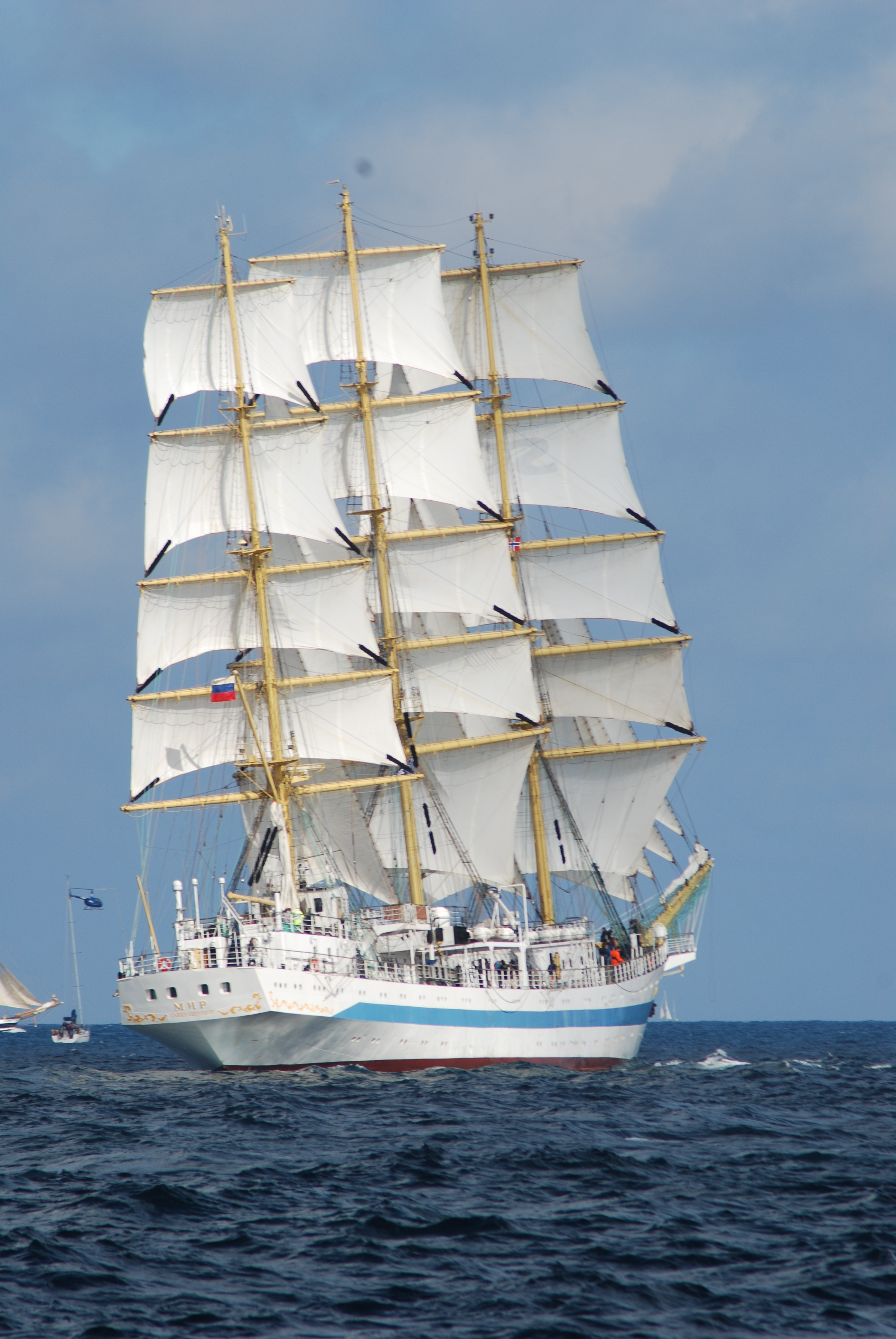 Mir, Start w regatach Kristiansand - Operacja Żagiel 2010